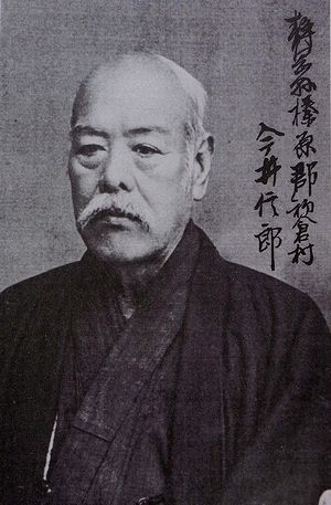 初倉村に生まれた塚本昭一氏が、幕末維新にかけての正しい歴史認識と、真の信郎像を多くの方々に理解していただき、後世に語り継いでいただきたいとゆう願いから出版しました。